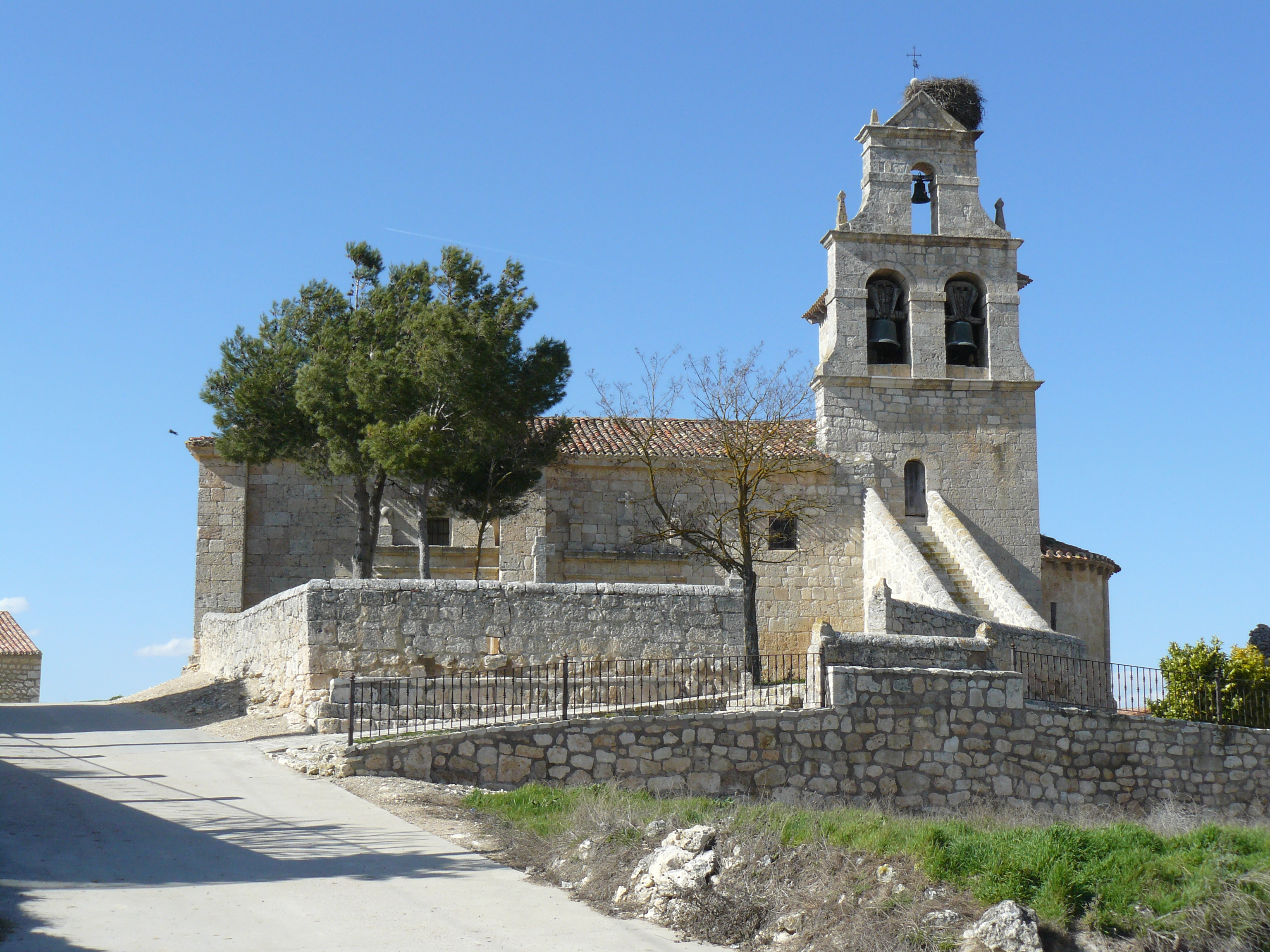 Bahabón de Esgueva, Burgos.